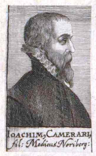 Joachim Camerarius der Jüngere (1534–1598)